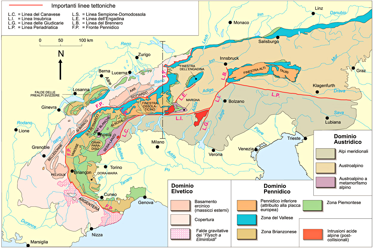 Carta delle Unità strutturali delle Alpi divise nei tre domini paleogeografici